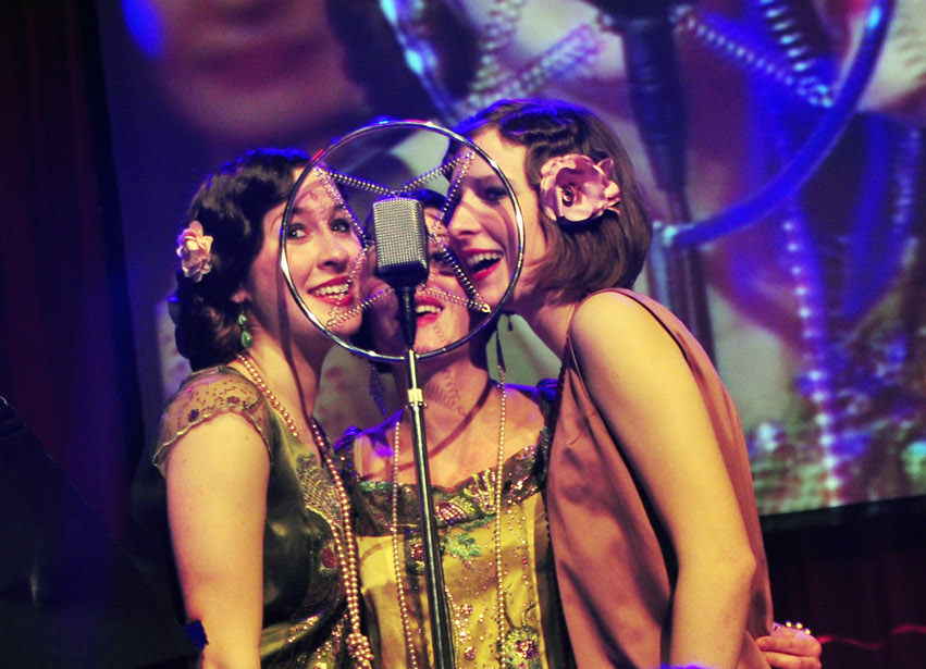 Bratislava Hot Serenaders